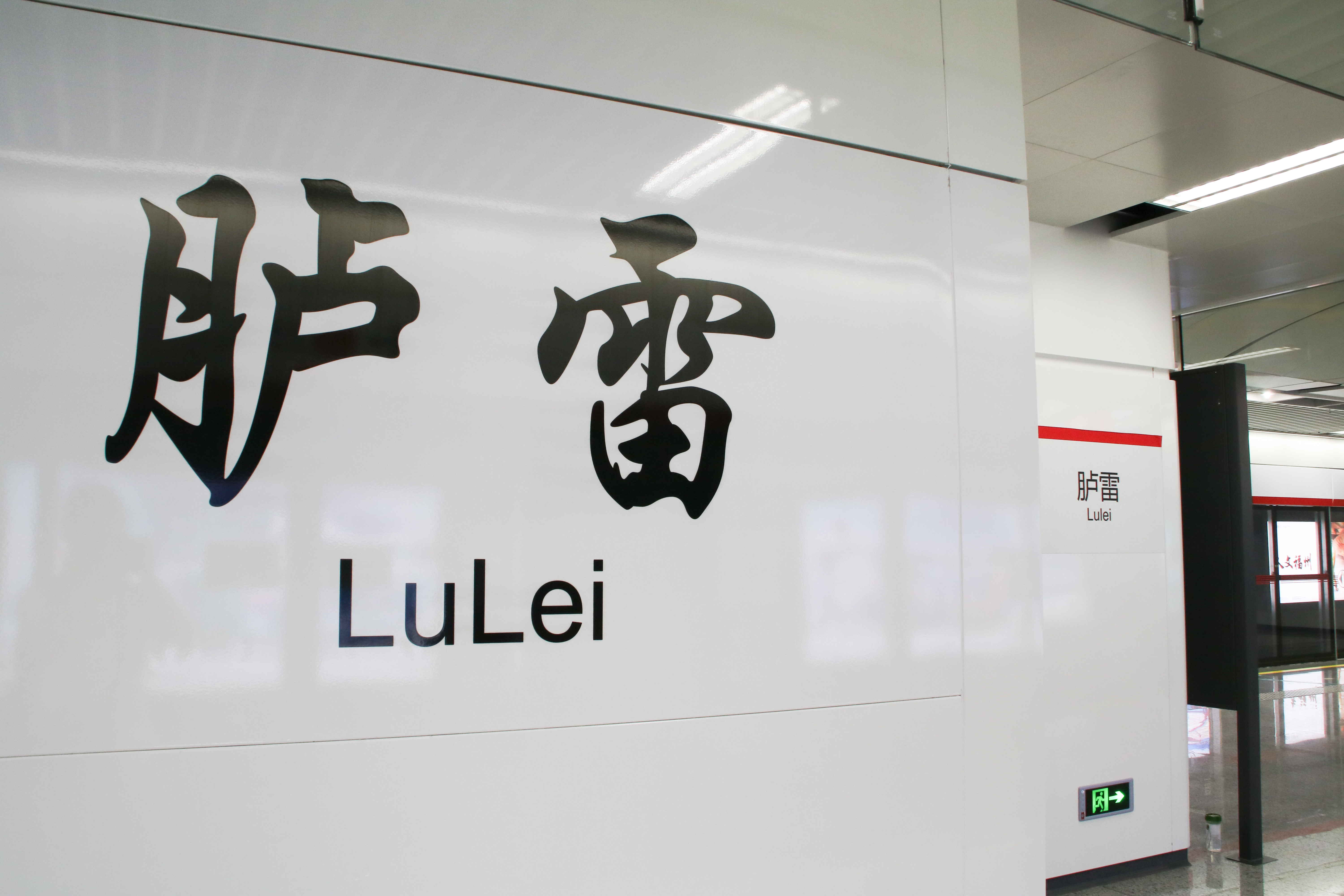 胪雷站名牌